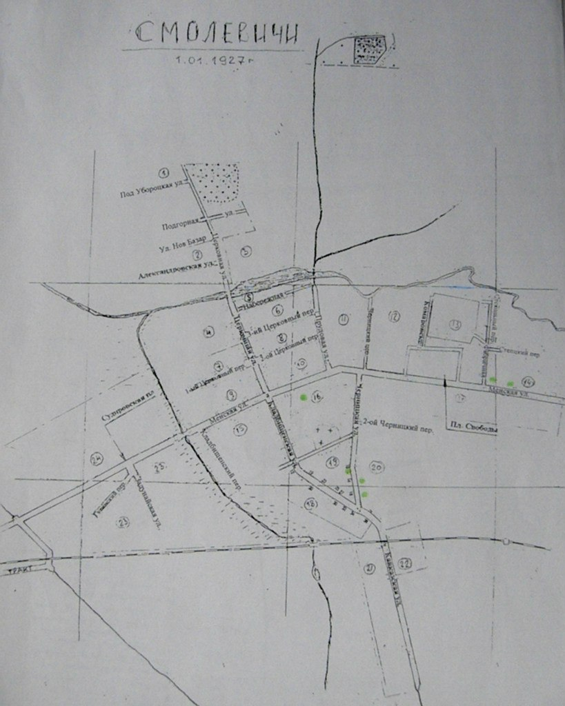 Беларуская (тарашкевіца): Смалявічы (Smalavičy)